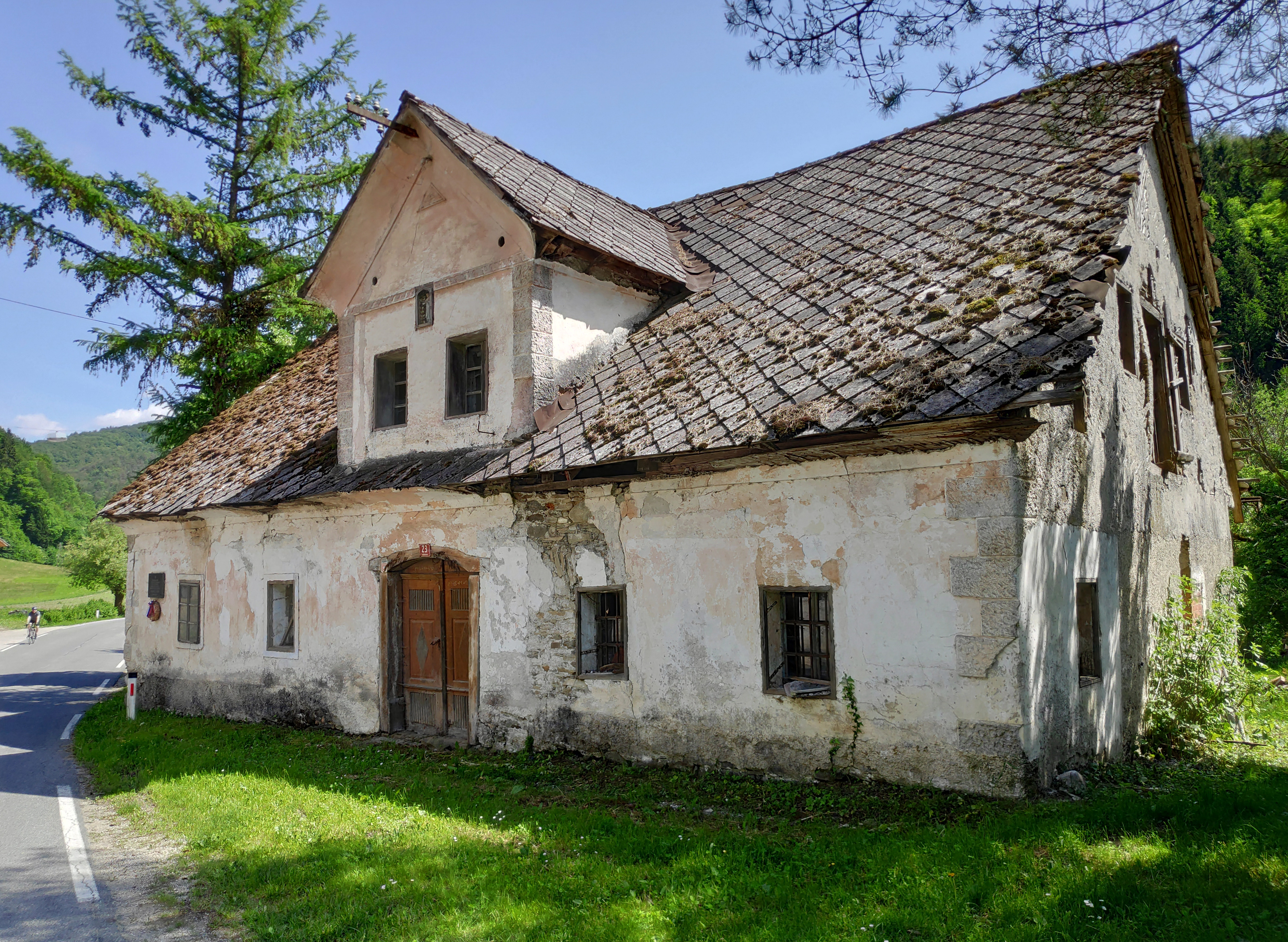 Osrednjedolenjska delavsko-kmečka hiša z mansardo v dolini Besnice (občina Ljubljana) This media shows a cultural heritage object of Slovenia with the EŠD number: 18708